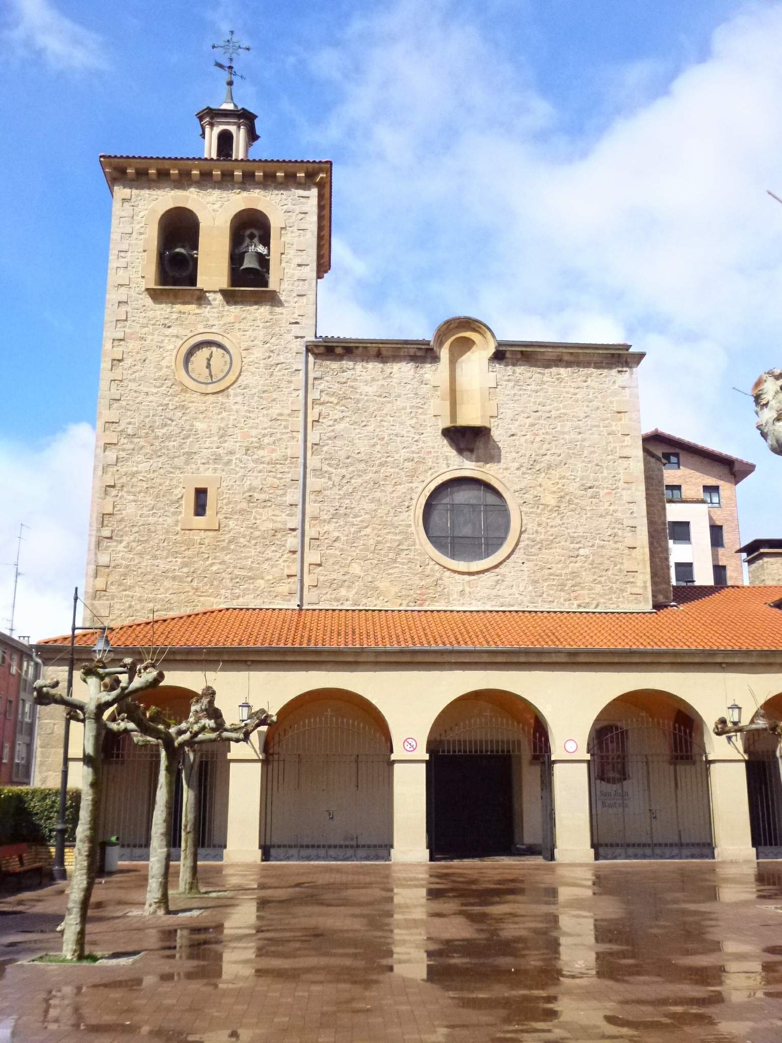 Iglesia de San Juan Bautista (Burlada, Navarra)